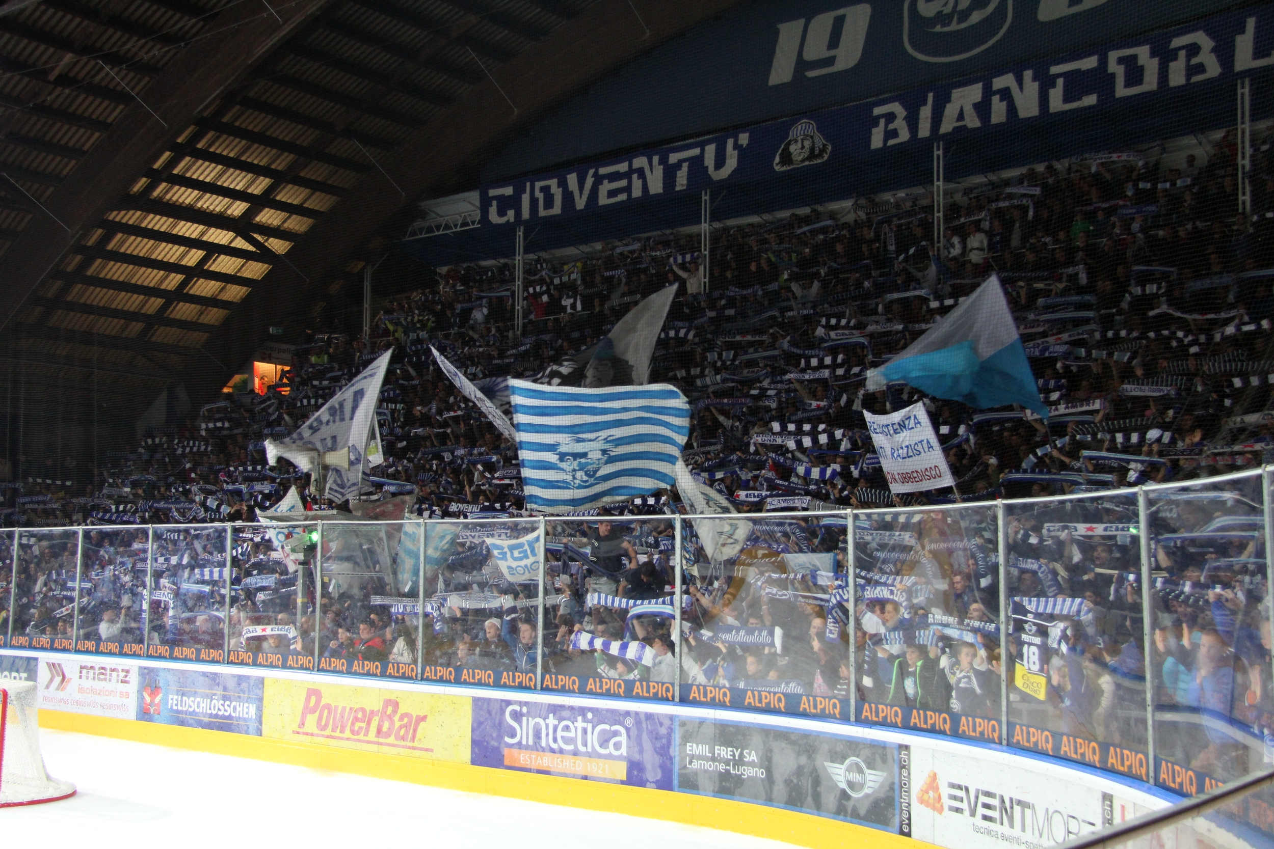 Tribune debout chantant la Montanara après la victoire du HCAP.